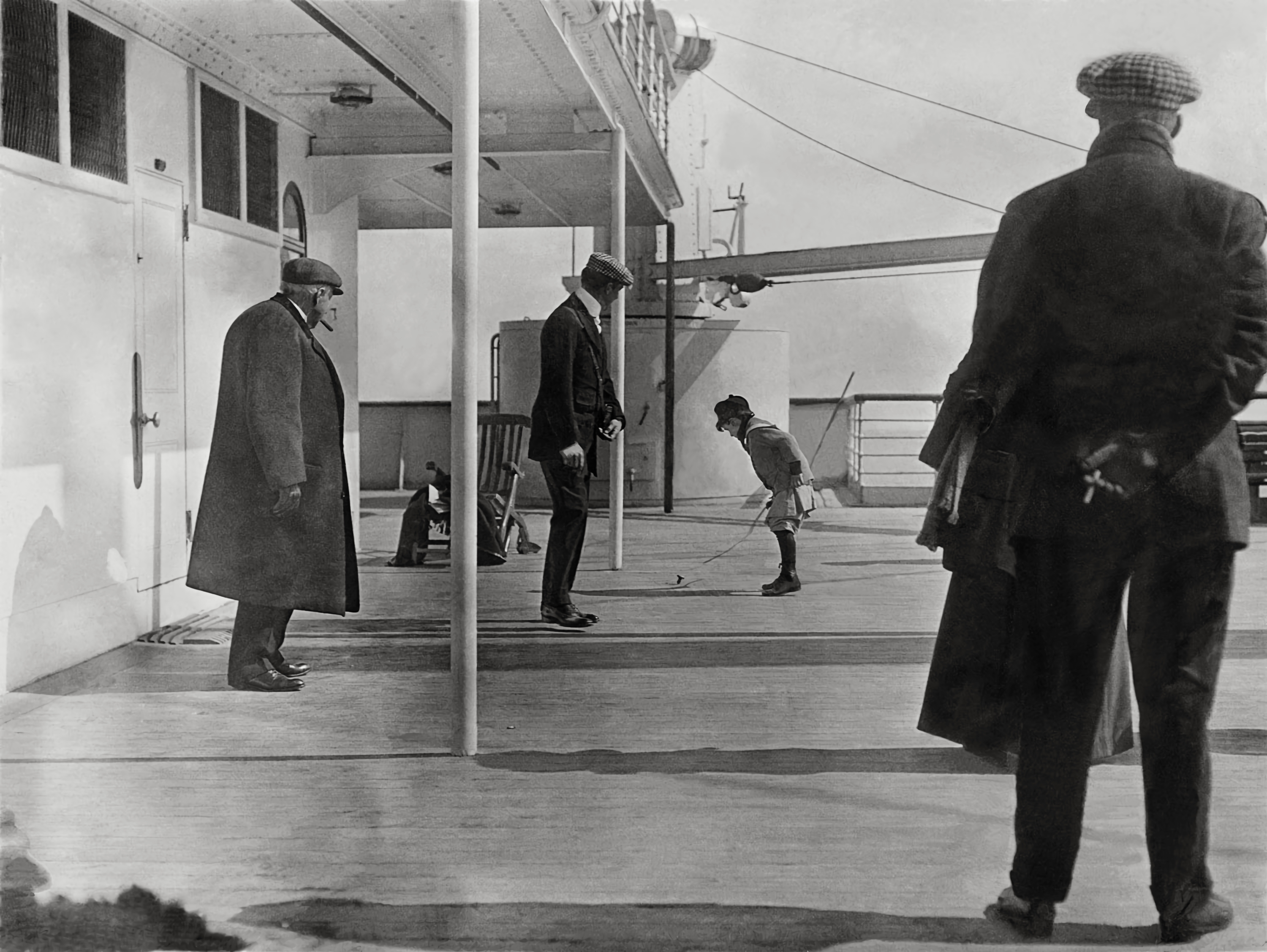 Пассажиры «Титаника»: шестилетний Роберт Дуглас Спеден запускает волчок, а его отец Фредерик наблюдает.